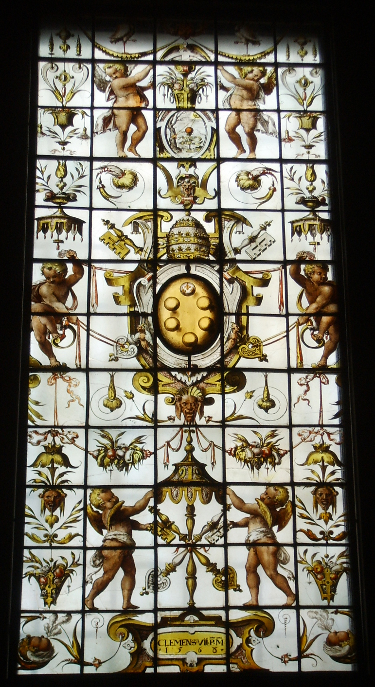 Biblioteca medicea laurenziana vetrata 13 clemente VII